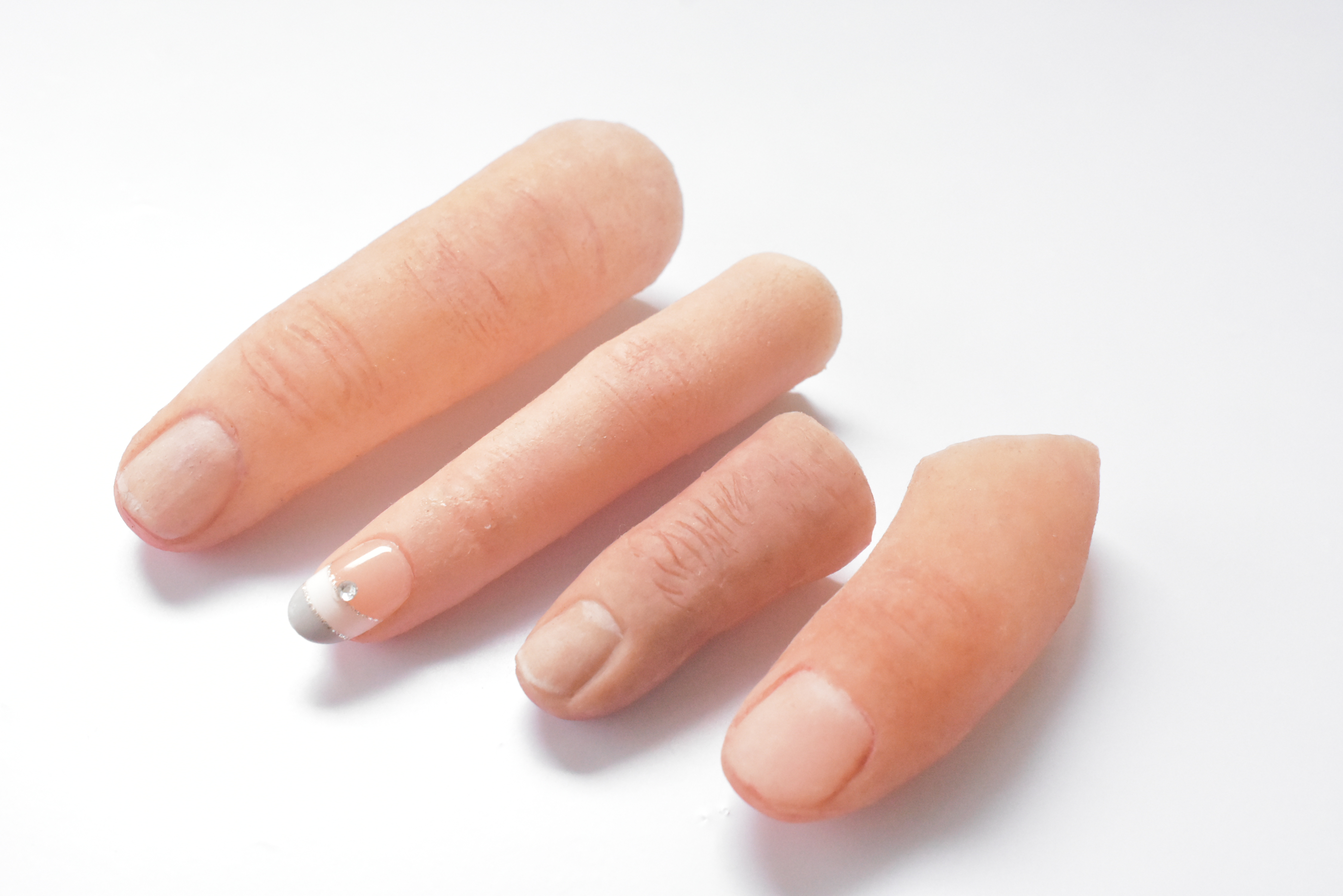 指のおしゃれエピテーゼのサンプルが数本あります。 エピテみやびオリジナルの「エピテ®」で、主に女性用です。 装飾性が高く、指を切断された方や、短指症に悩まれている女性用です。これらはネイルアートを楽しむことができます。